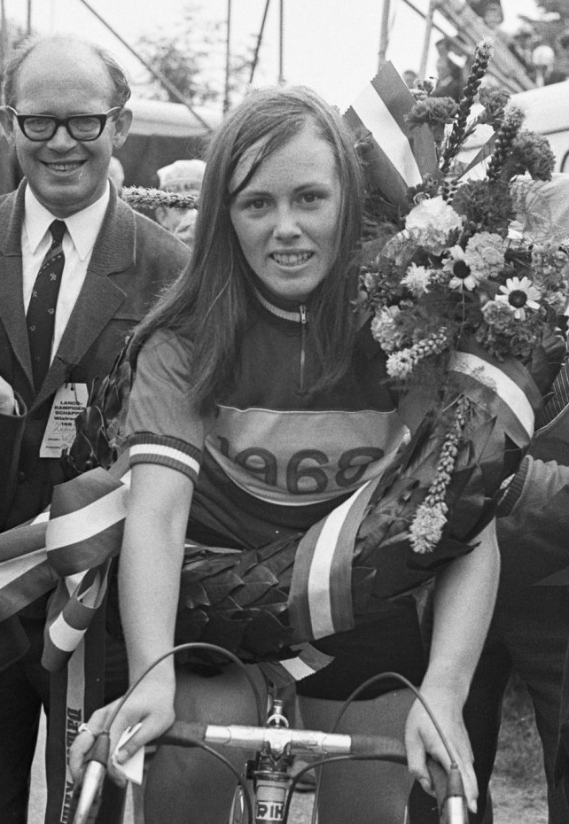 Nederlandse wielerkampioenschappen op de weg te Beek dame Nummer 7 Bella Hage met vader